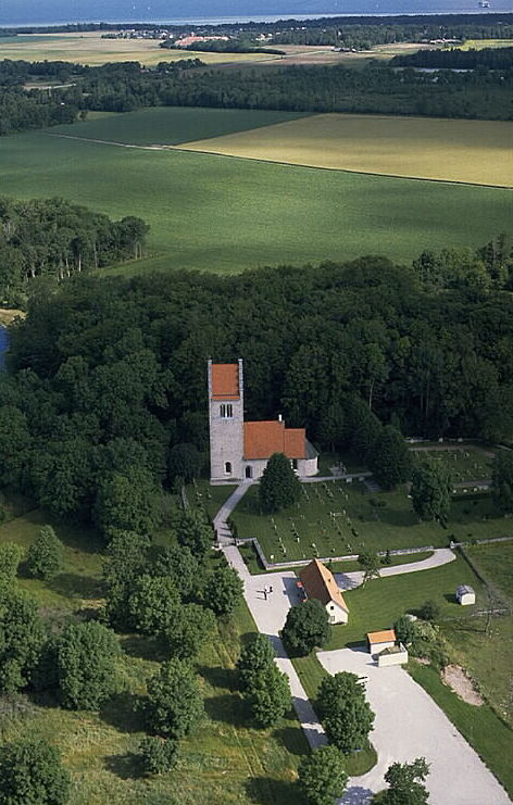 Motiv: Västerhejde kyrka Nyckelord: Flygbilder, Riksintressen Kategori: KyrkomiljöVästerhejde kyrka